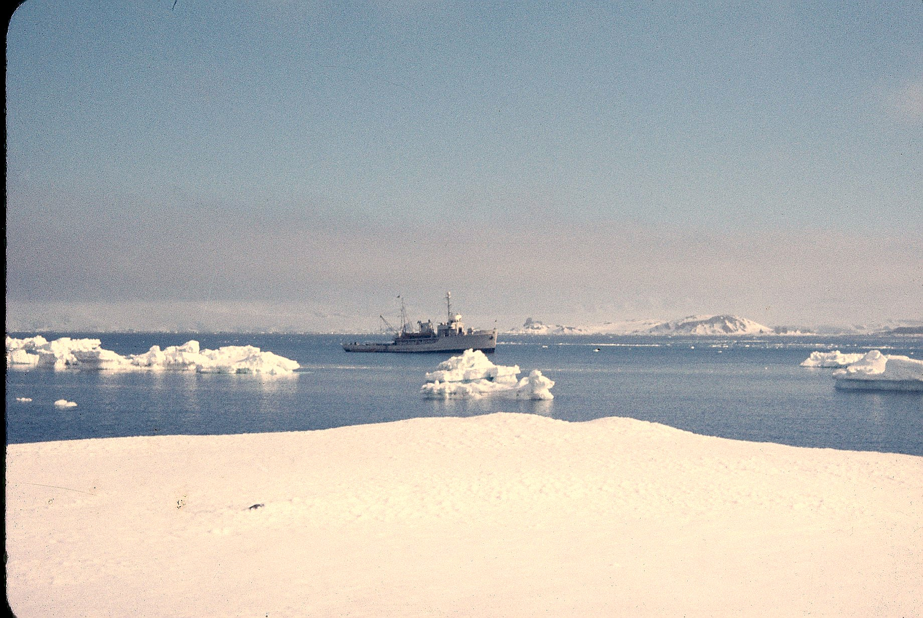 El Lientur fondeado en Copper Mine, isla Roberts